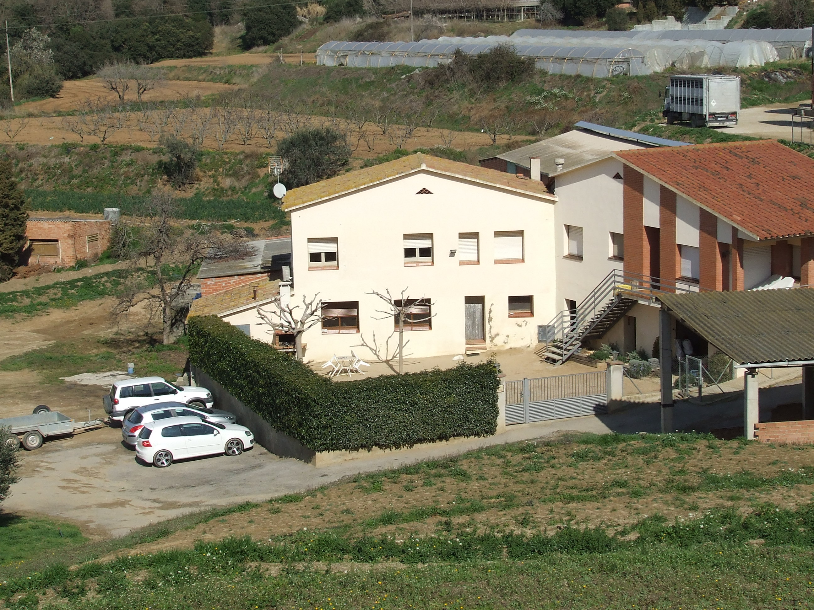 Can Puig (El Veïnat, Bigues, Bigues i Riells, Vallès Oriental)